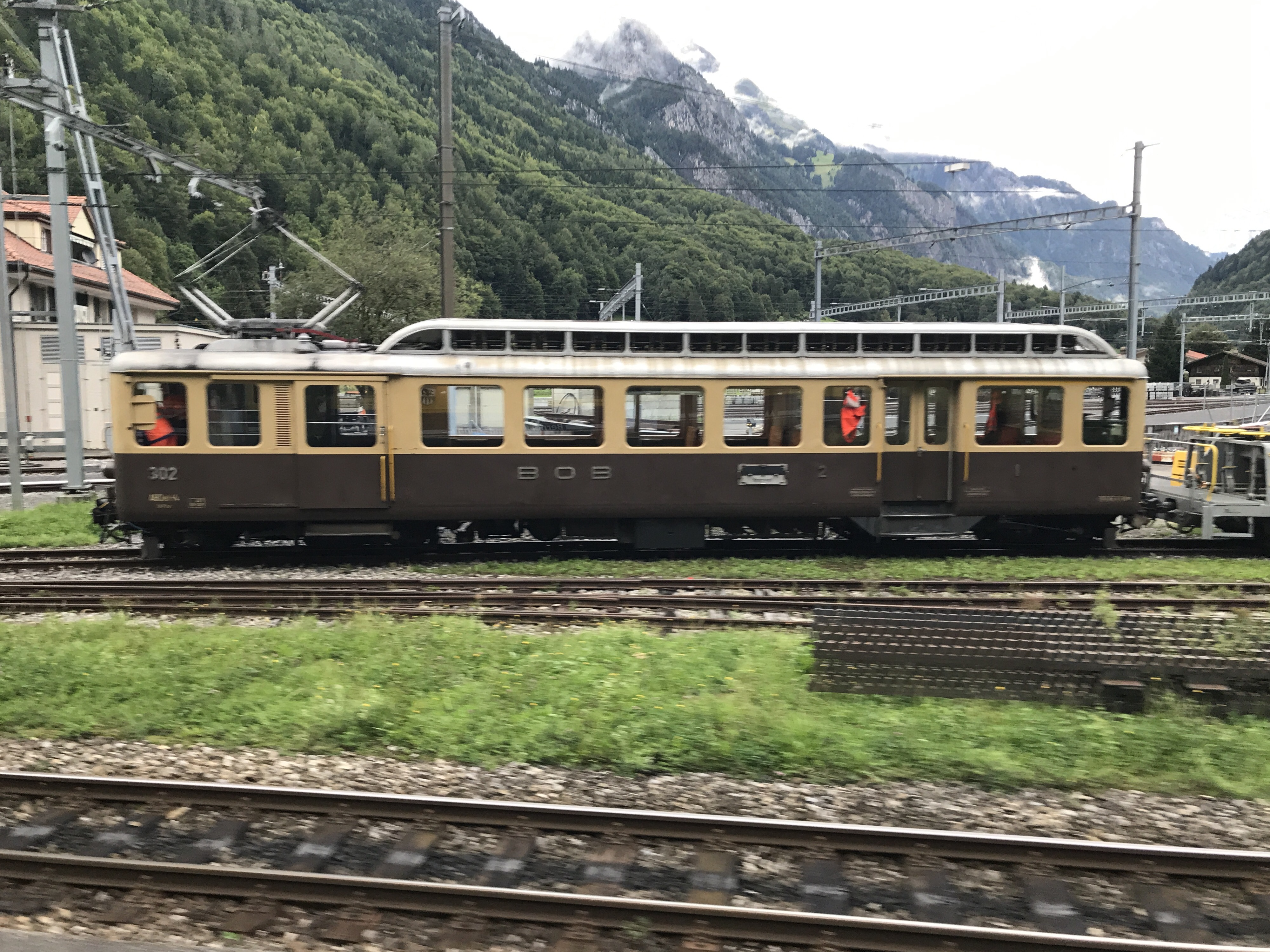 Der ABDeh 4/4 302 der BOB mit Kieswagen in Zweilütschinen